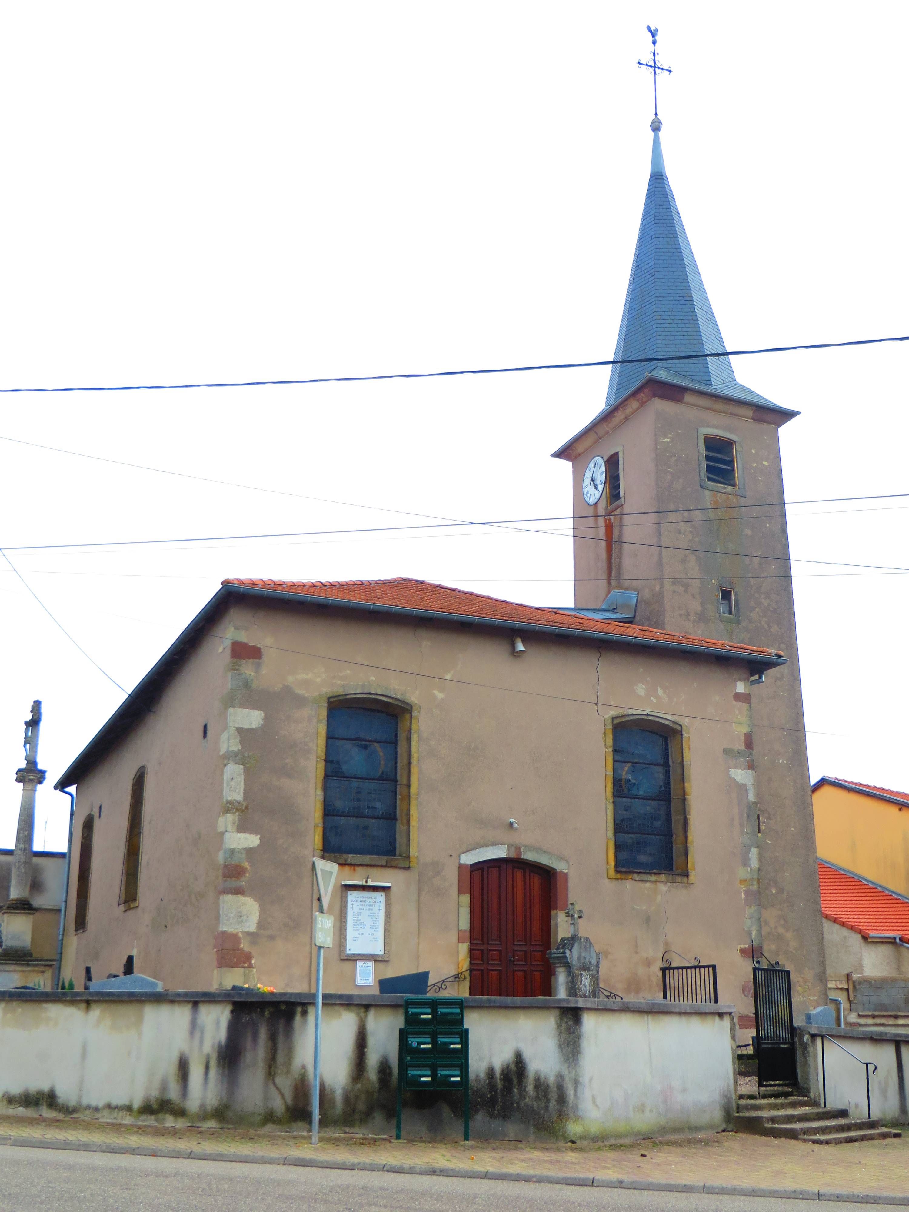 Guéblange-lès-Dieuze Église Saint-Georges